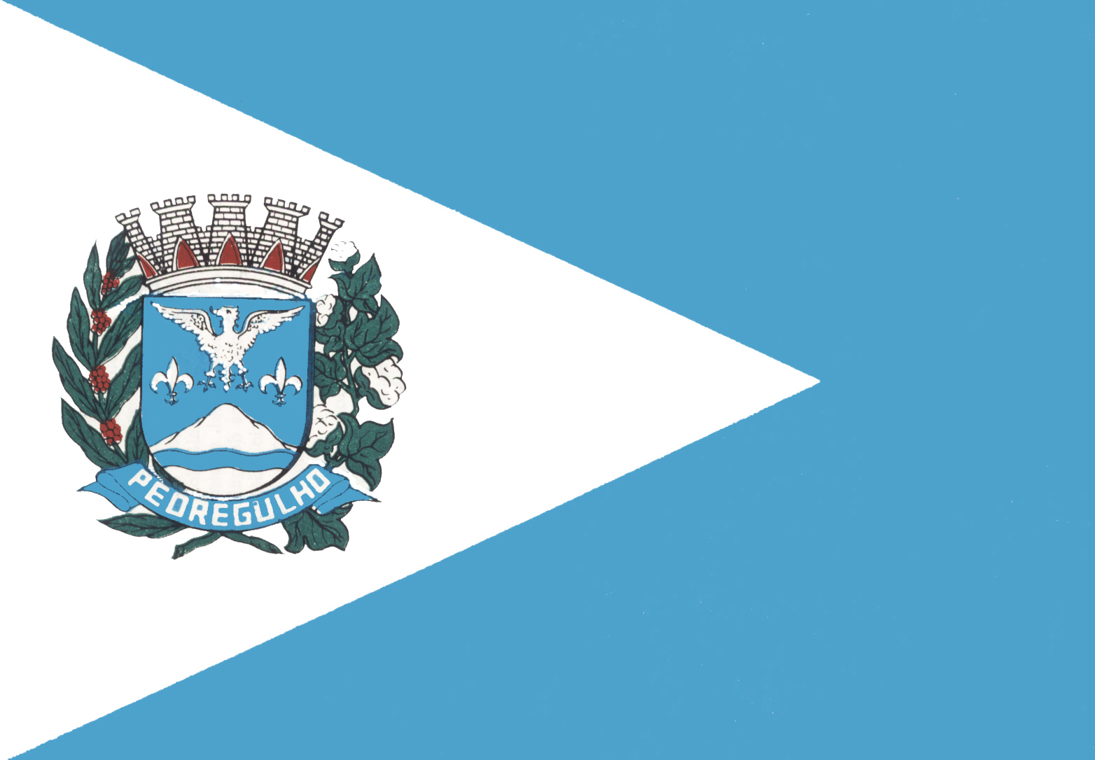 Brasão do município de: Pedregulho, São Paulo, Brasil